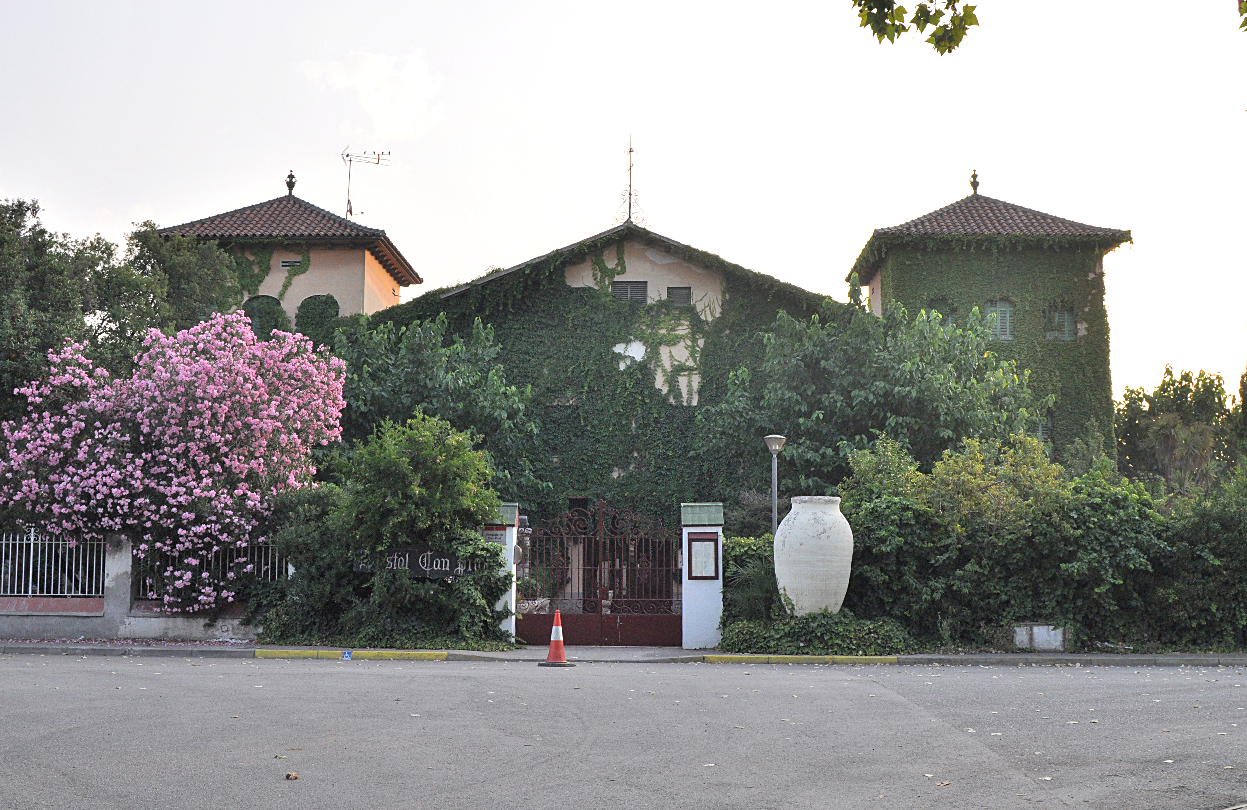 Mollet del Vallès: Hostal Can Prat.